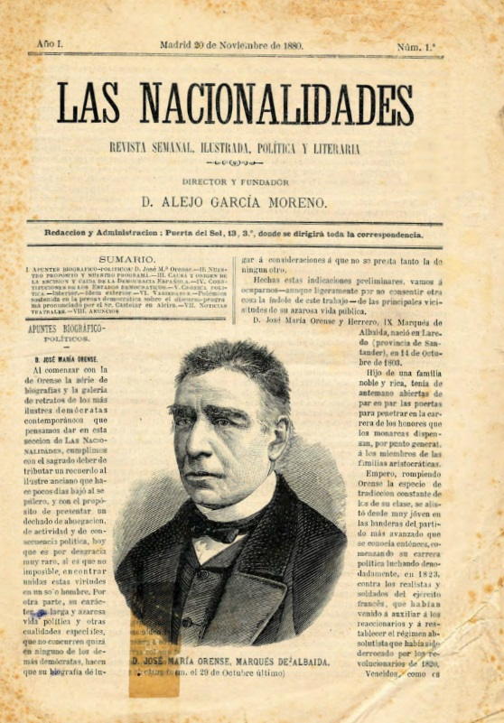 Portada do primeiro número da revista Las Nacionalidades